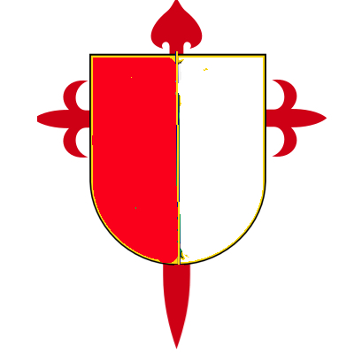 Armas de DAMETO sobre cruz de Santiago